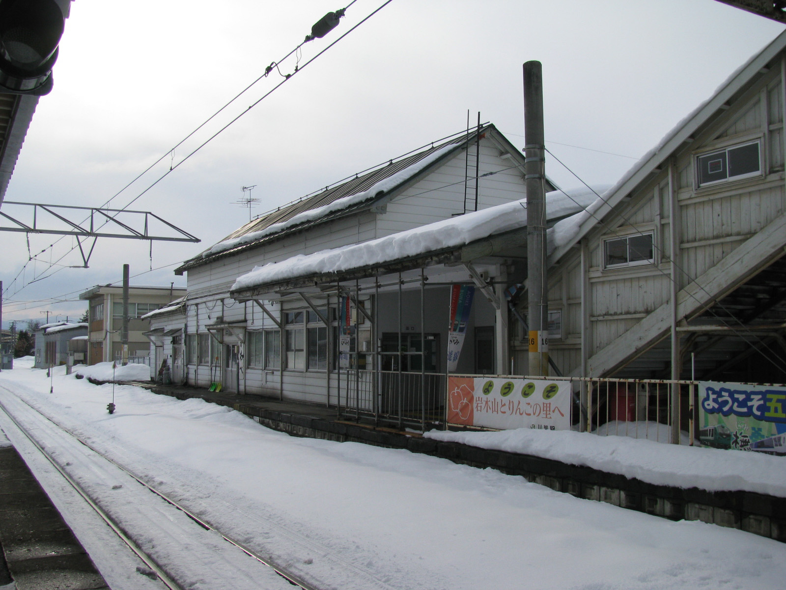 JR川部駅